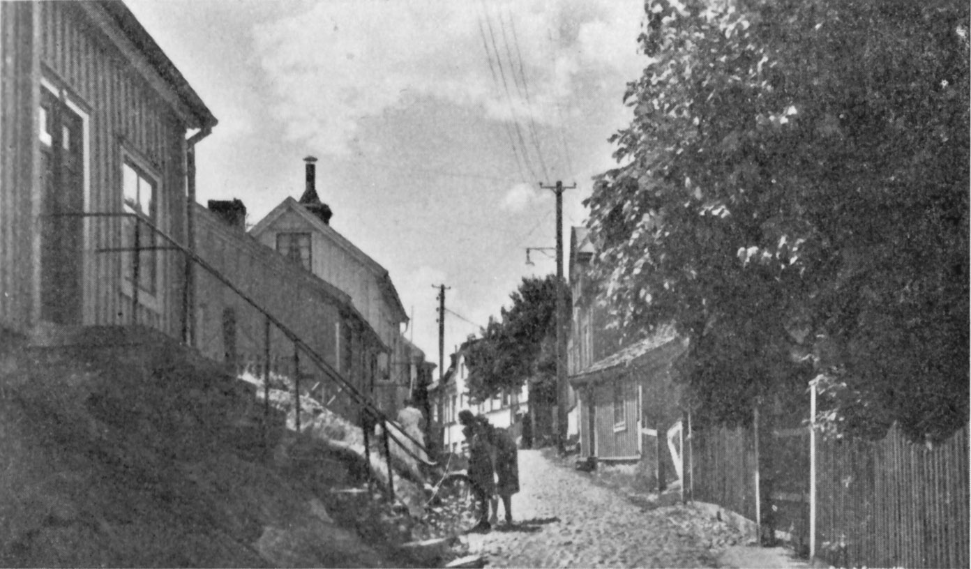 Besvärsgatan Oskarshamn trol. 1940-tal